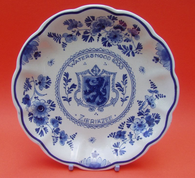 Erinnerungsteller der Sturmflutkatastrophe von 1953 der Delfter Porzellanmanufacture De Koninklijke Porceleyne Fles